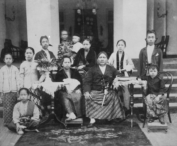 Foto. Portret van een regent in de residentie Bantam met familie